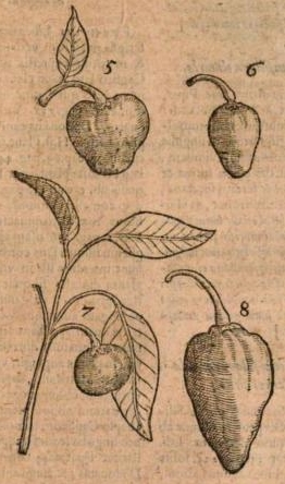 Genera 5-8 capsicorum. Gregorius de Regio, "De varietate capsicorum"